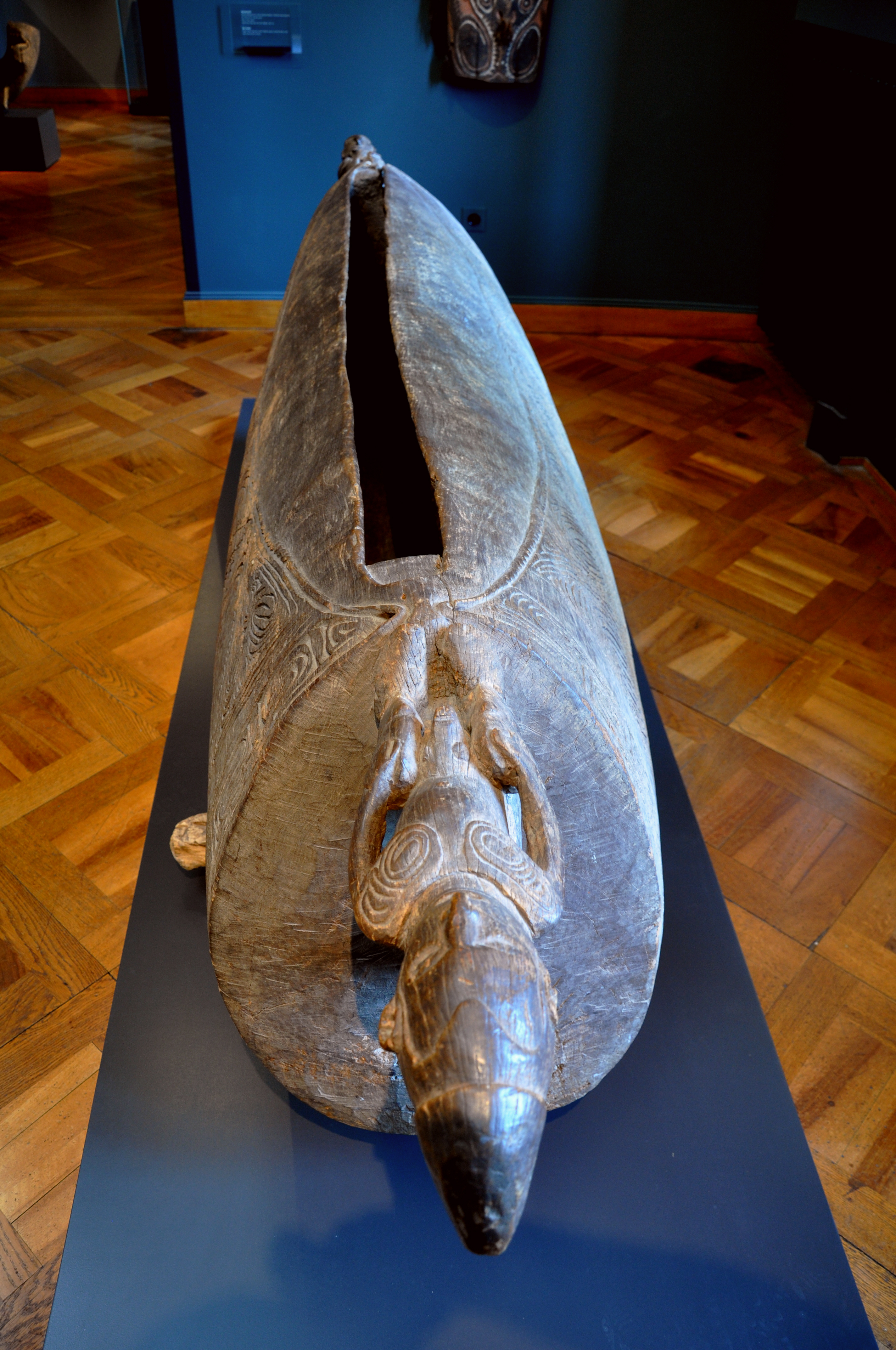 Grosse Schlitztrommel, Papua-Neuguinea, mittlere Sepik-Region, 18./19. Jh.; Holz Museum Rietberg, Zürich; Geschenk Rietberg-Kreis, Inv. Nr. 2005.57